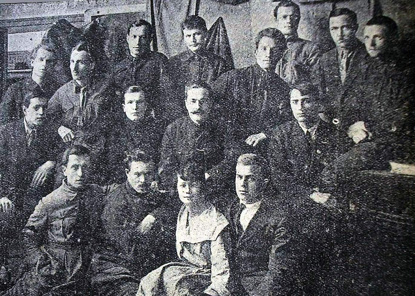 Спілка селянських письменників "Плуг". Стоять. Копиленко, Панч, Кожицький, Степовий, Грудина, Никифорчук, Шевченко. Сидять. Вражливий, Божко, Пилипенко, Сосюра. Сидять унизу: Капустянський, Шостак, Романоська, Бедзик.